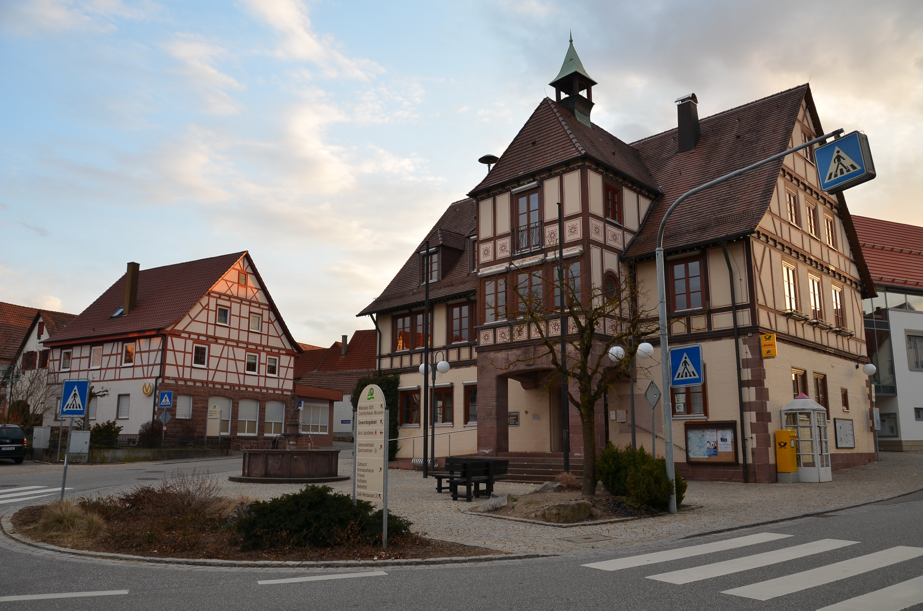 Deckenpfronn, Germany